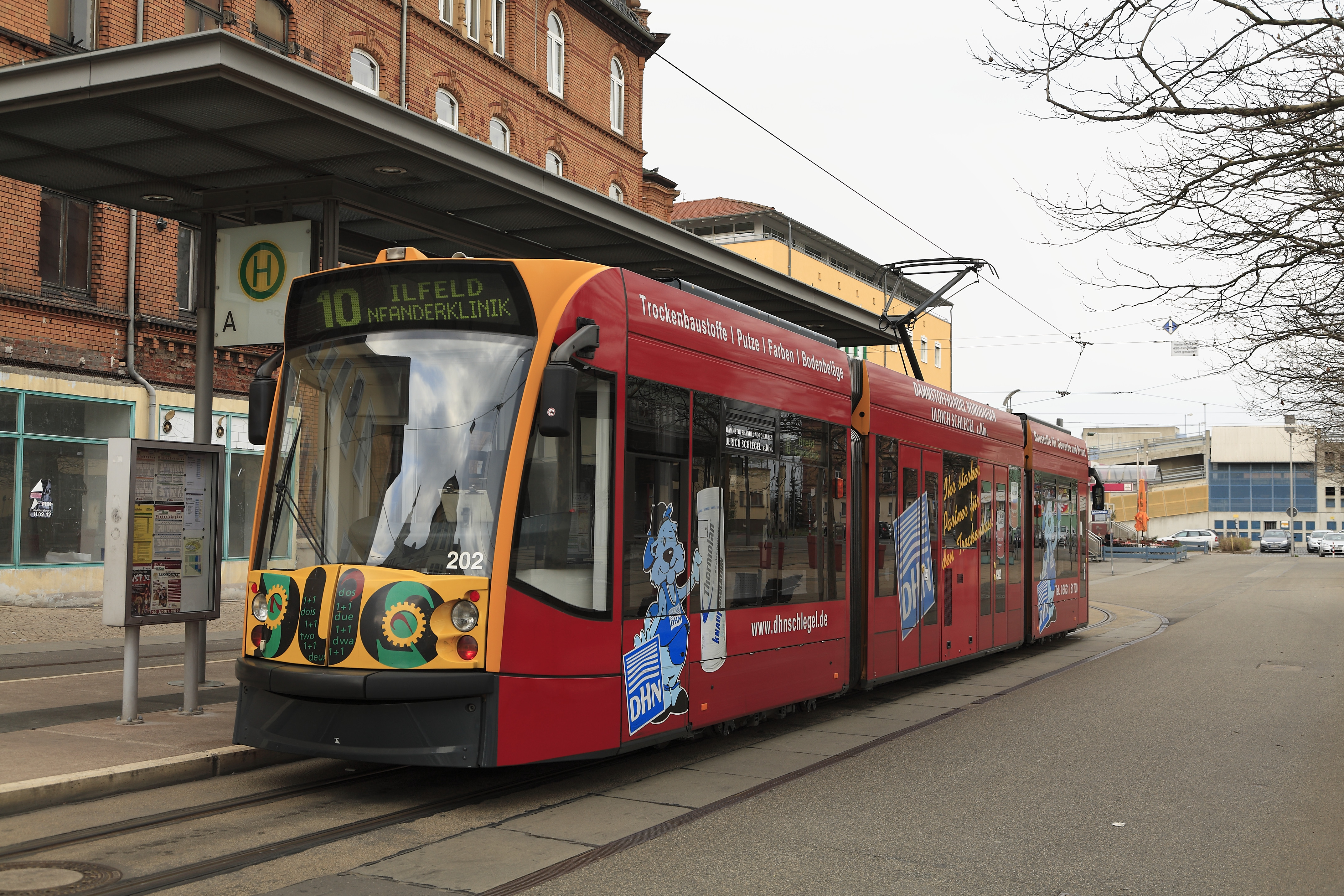 Einer der nur drei Zweikrafttriebwagen auf der Linie 10 vom Krankenhaus nach Ilfeld beim Kopfmachen auf dem Bahnhofsplatz. Das rechte Gleis der Wendeschleife kann wegen des Inselbahnsteiges nur von Wagen mit Türen auf beiden Seiten genutzt werden. Der Zug wird nach dem Umschalten auf Dieselbetrieb und Richtungswechsel in Richtung auf der HSB-Strecke nach Ilfeld weiterfahren.Das verkleinerte Fenster im Mittelteil kennzeichnet die Seite mit dem Dieselgenerator.